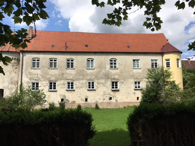 Südseite des Schlosses